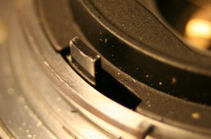 photo Jean-Daniel Dodin 20051015